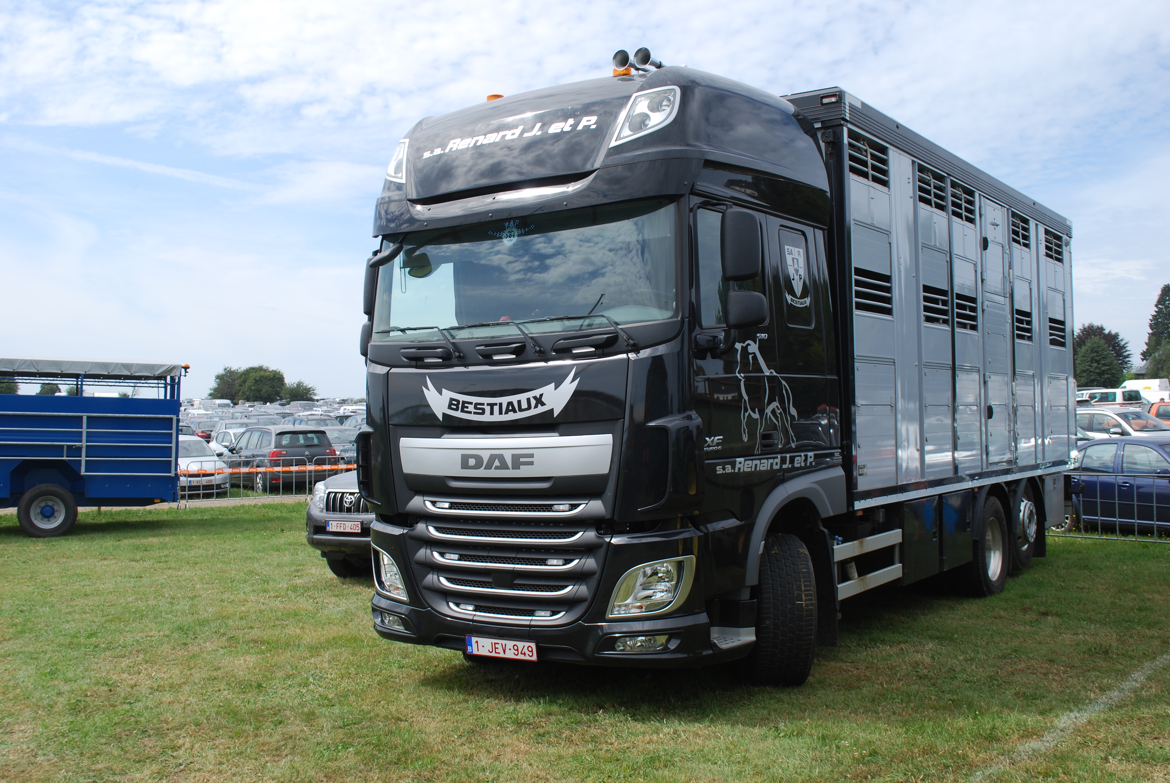 Vue de la 81e foire agricole de Libramont, en 2015.